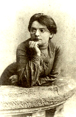 Деятель российского еврейского рабочего движения Мария Вильбушевич (1879-1961)